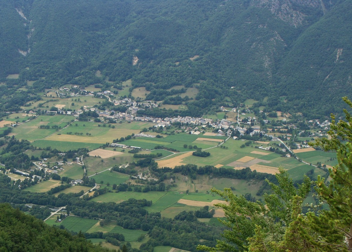 Vue quasi-aérienne du village de Valbonnais (Isère) et de la plaine environnante. La Bonne coule dans les arbres au premier plan.